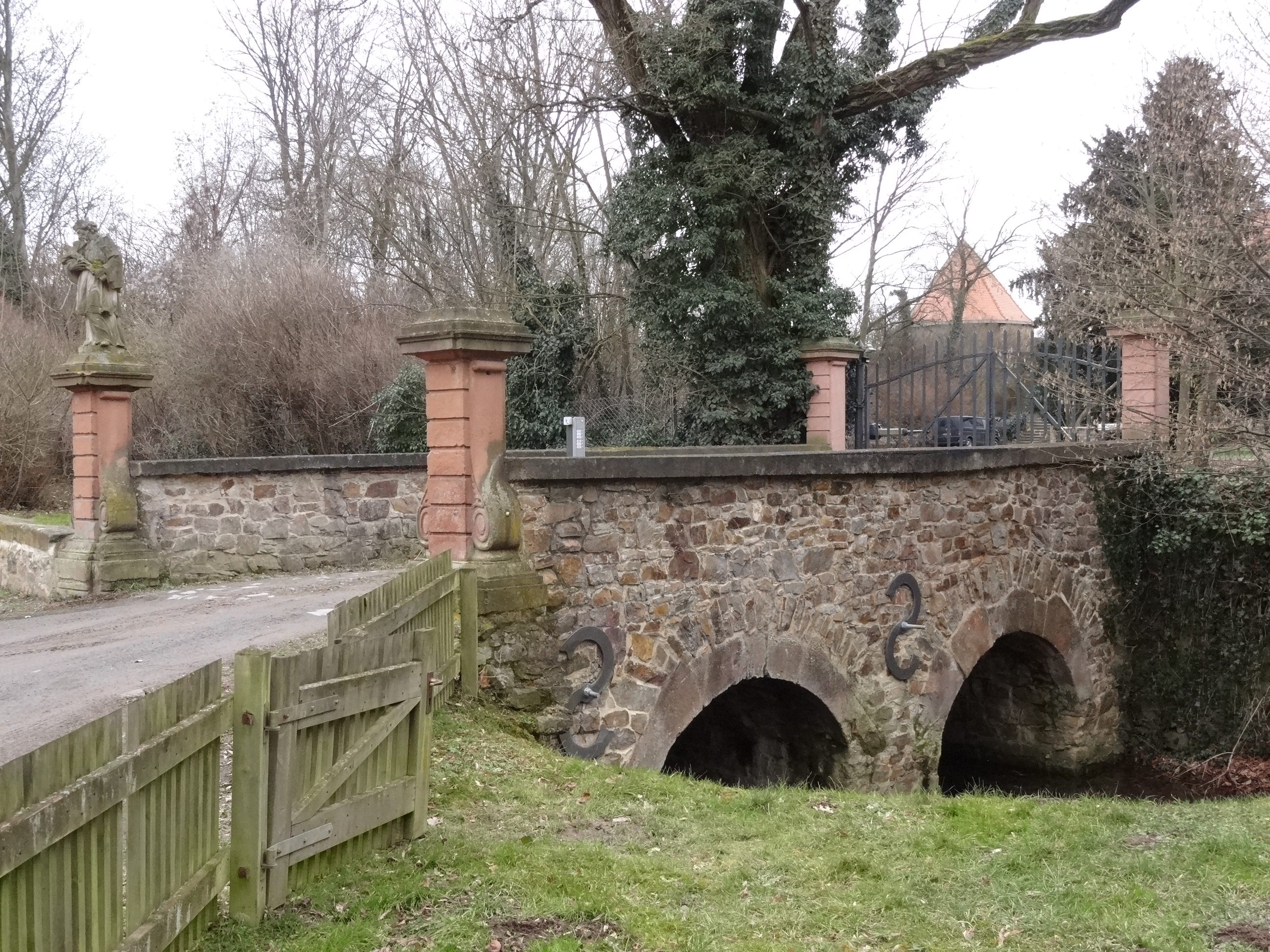 Ehemalige Wasserburg Ockstadt